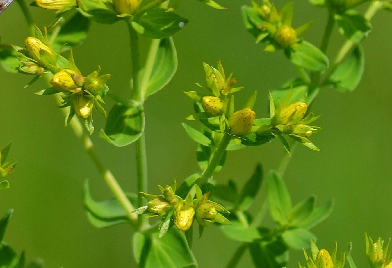 Dziurawiec zwyczajny